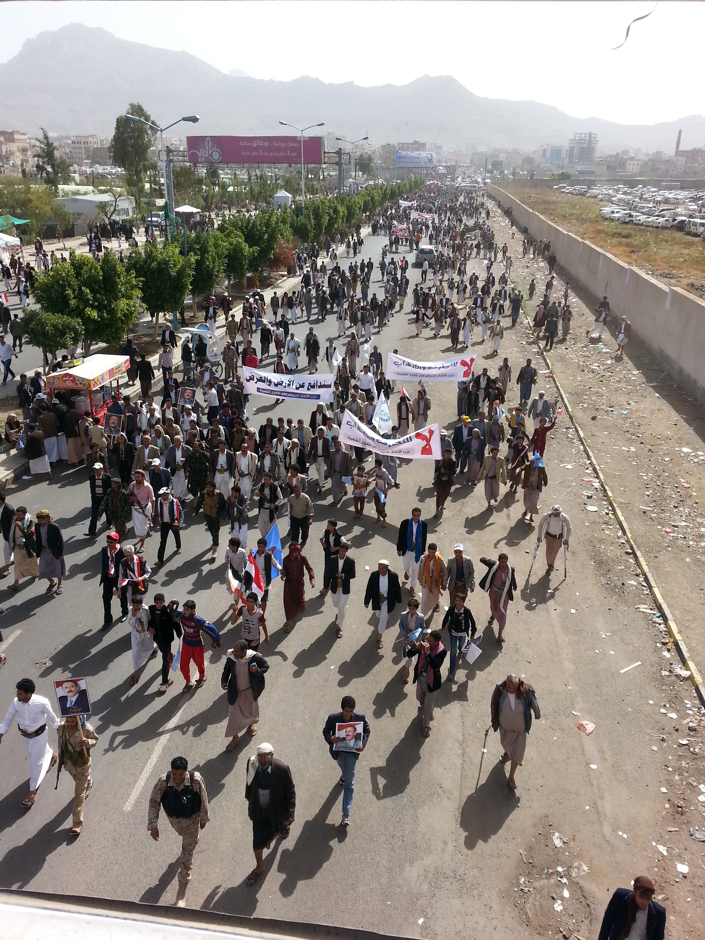 Yéménites voulaient arrêter les bombardements F-16 avions de combat